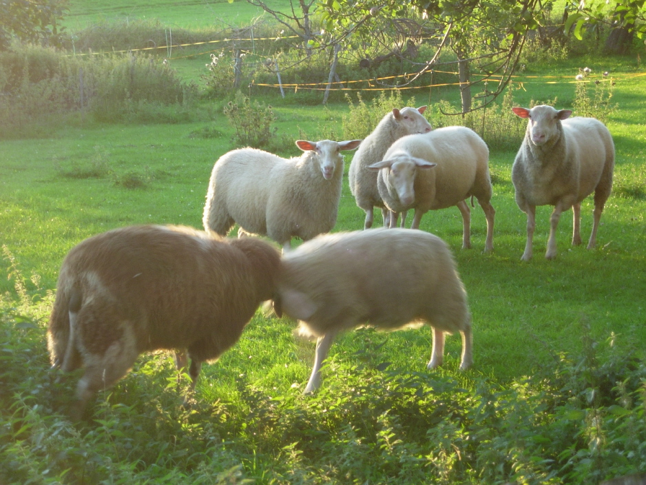 ostfriesische Milchschafe auf einer Streuobstwiese auf der Schwäbischen Alb